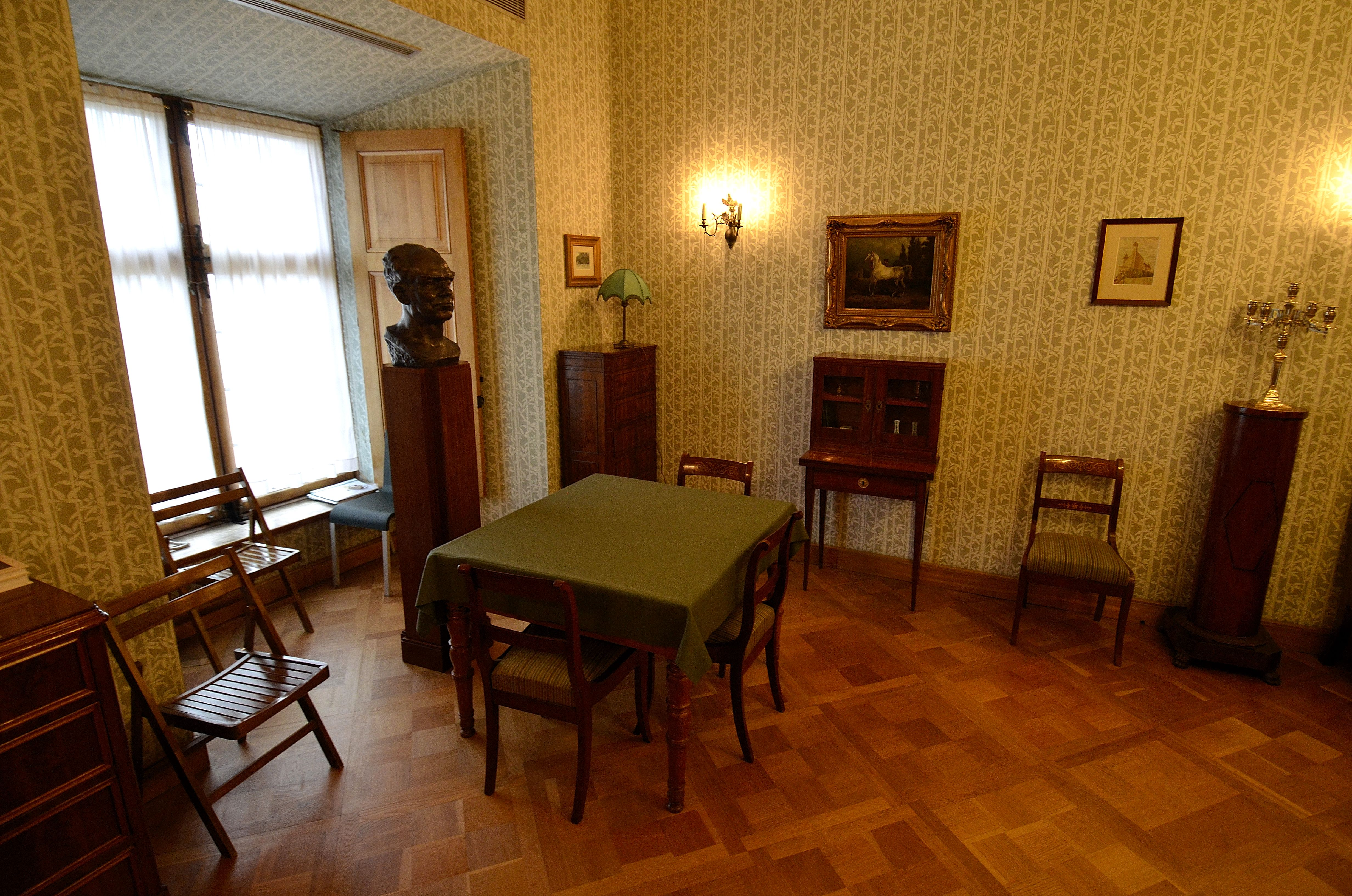 Pokój Pisarza. Mieszkanie Stefana Żeromskiego na Zamku Królewskim w Warszawie